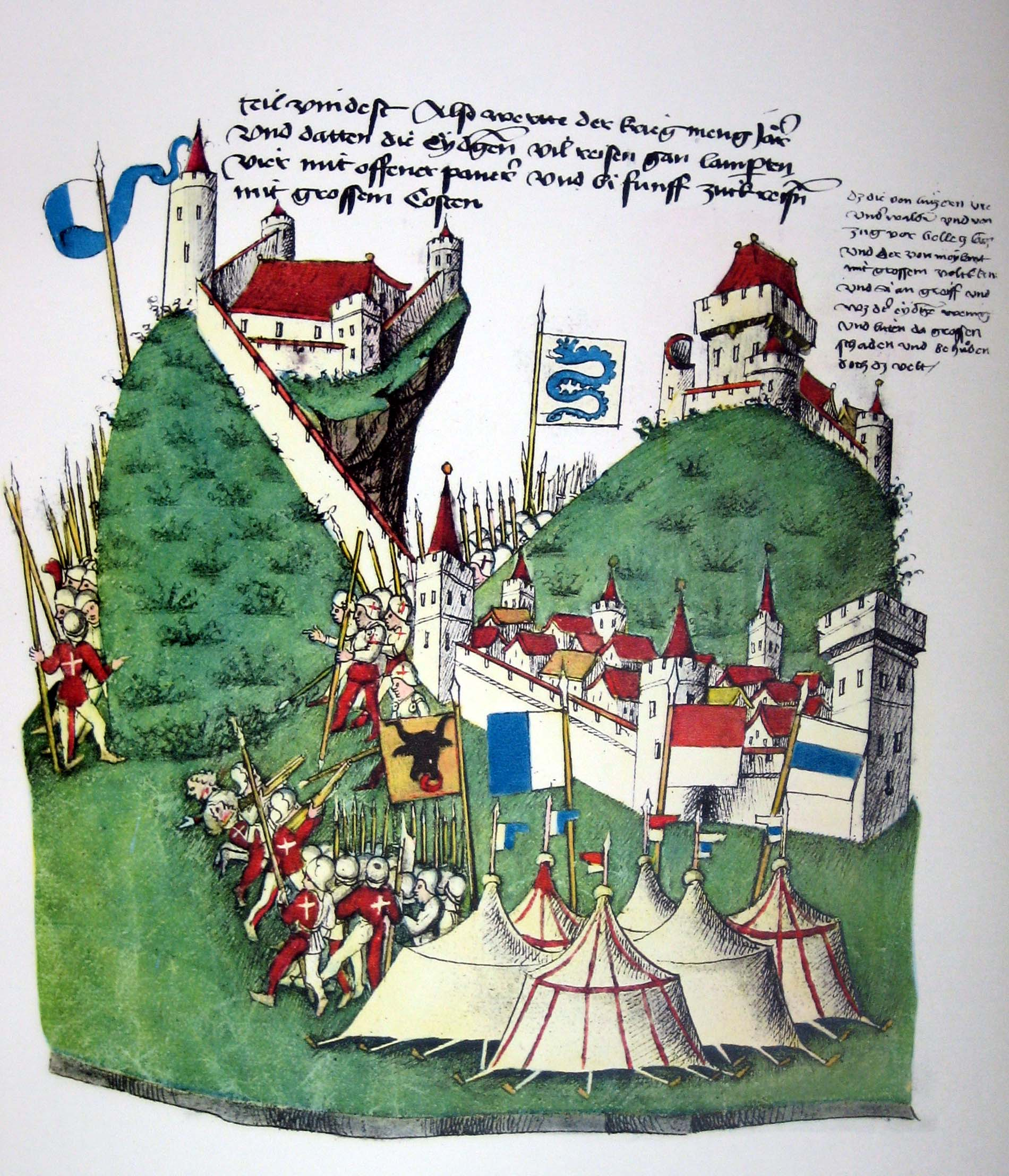 Die Schlacht bei Arbedo 1422. kolorierte Federzeichnung. Im Vordergrund das eidgenössische Lager mit den Bannern von Uri, Luzern, Unterwalden und Zug. Im Hintergrund die Festungen von Bellinzona mit den mailändischen Truppen unter dem Schlangenbanner von Mailand